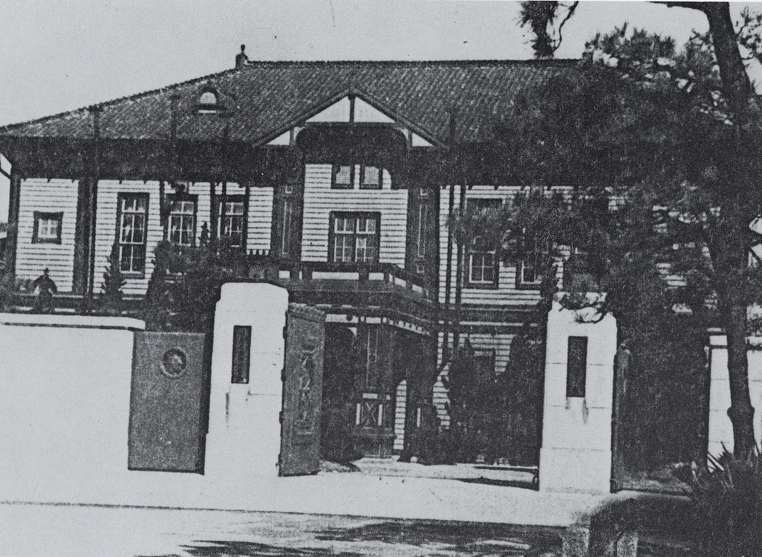 広島文理科大学正門